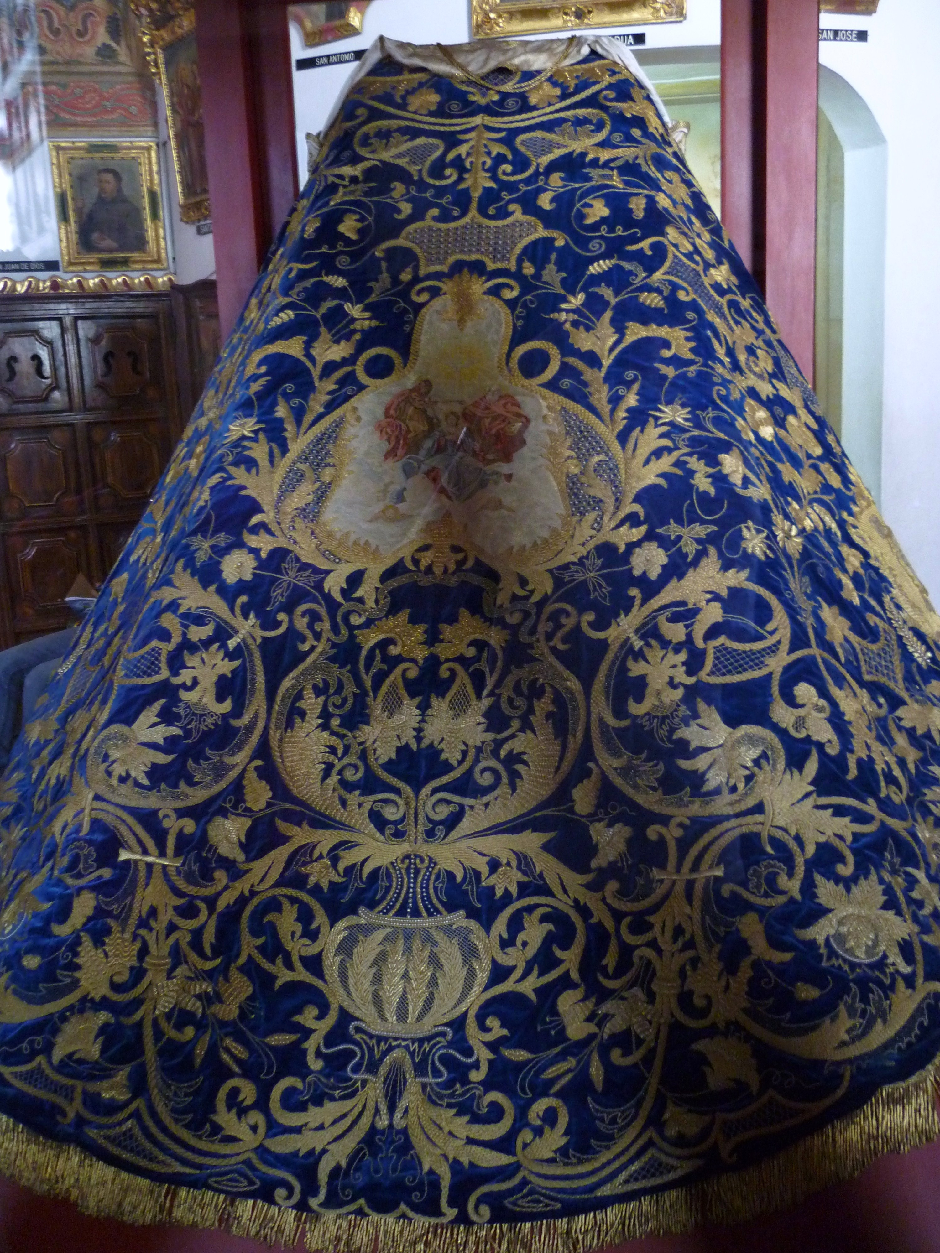 Manto con hilos de oro hecho en españa